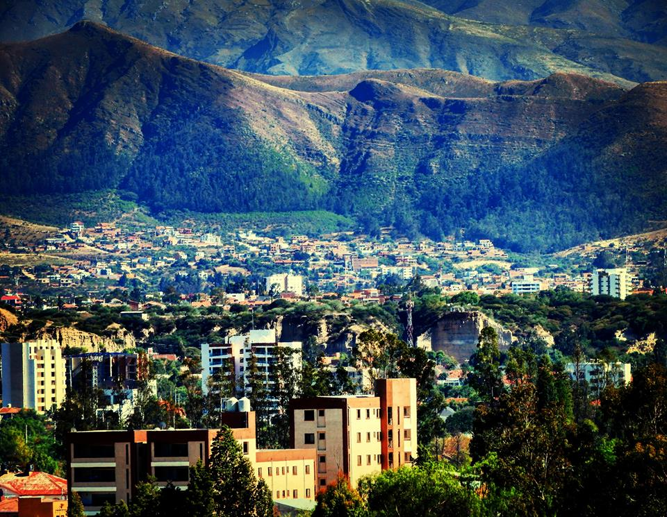 Barrio Miraflores